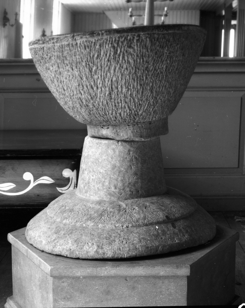 Tisselskogs kyrka. Dopfunt.